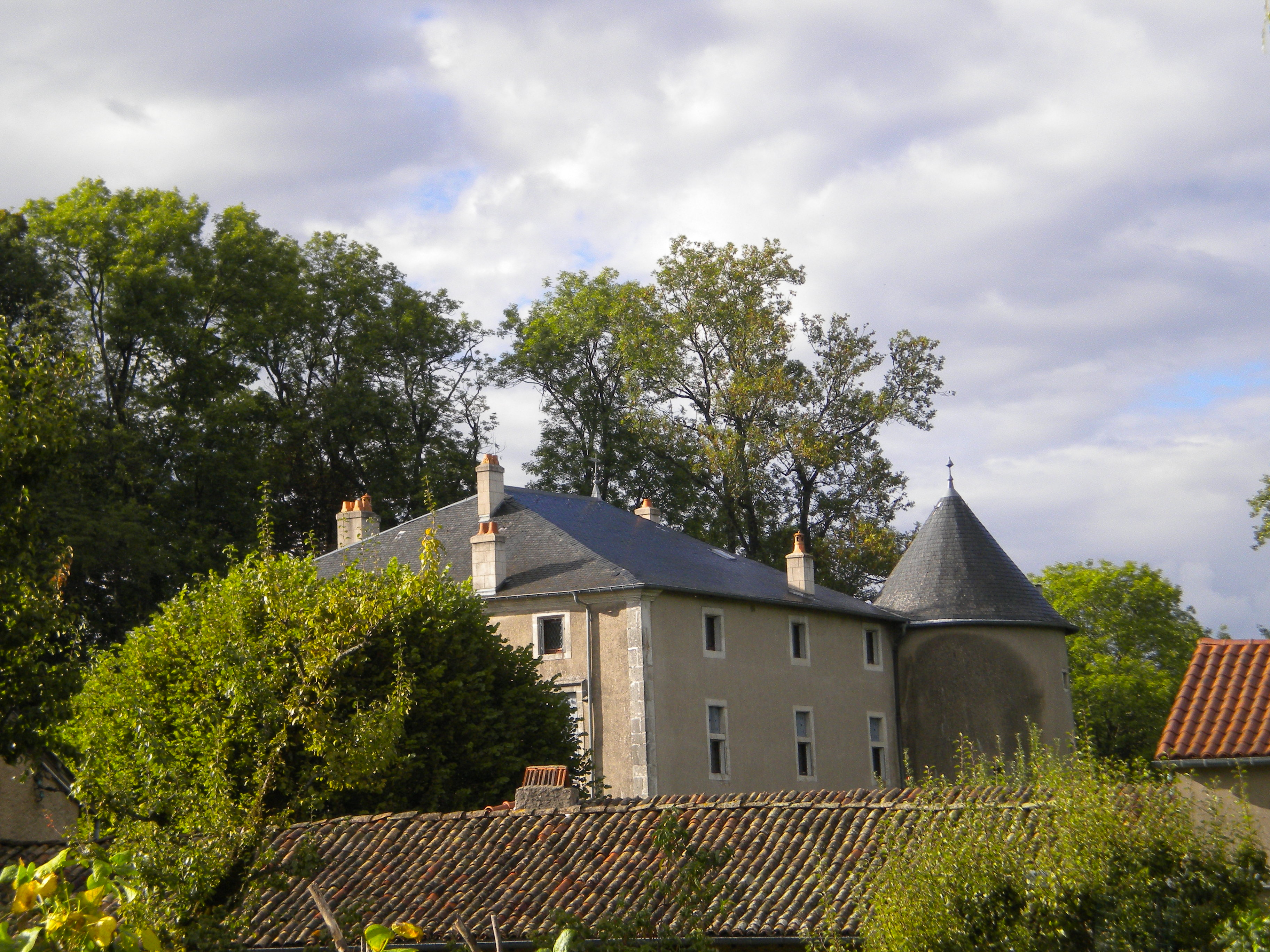 Photographie de la maison-forte de Tuméjus (XIVe-XVe s), à Bulligny, Meurthe-et-Moselle, Lorraine, France.